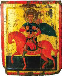 Икона на Св. Димитриј Солунски во црквата „Св. Богородица - Пречиста“, Враниште.